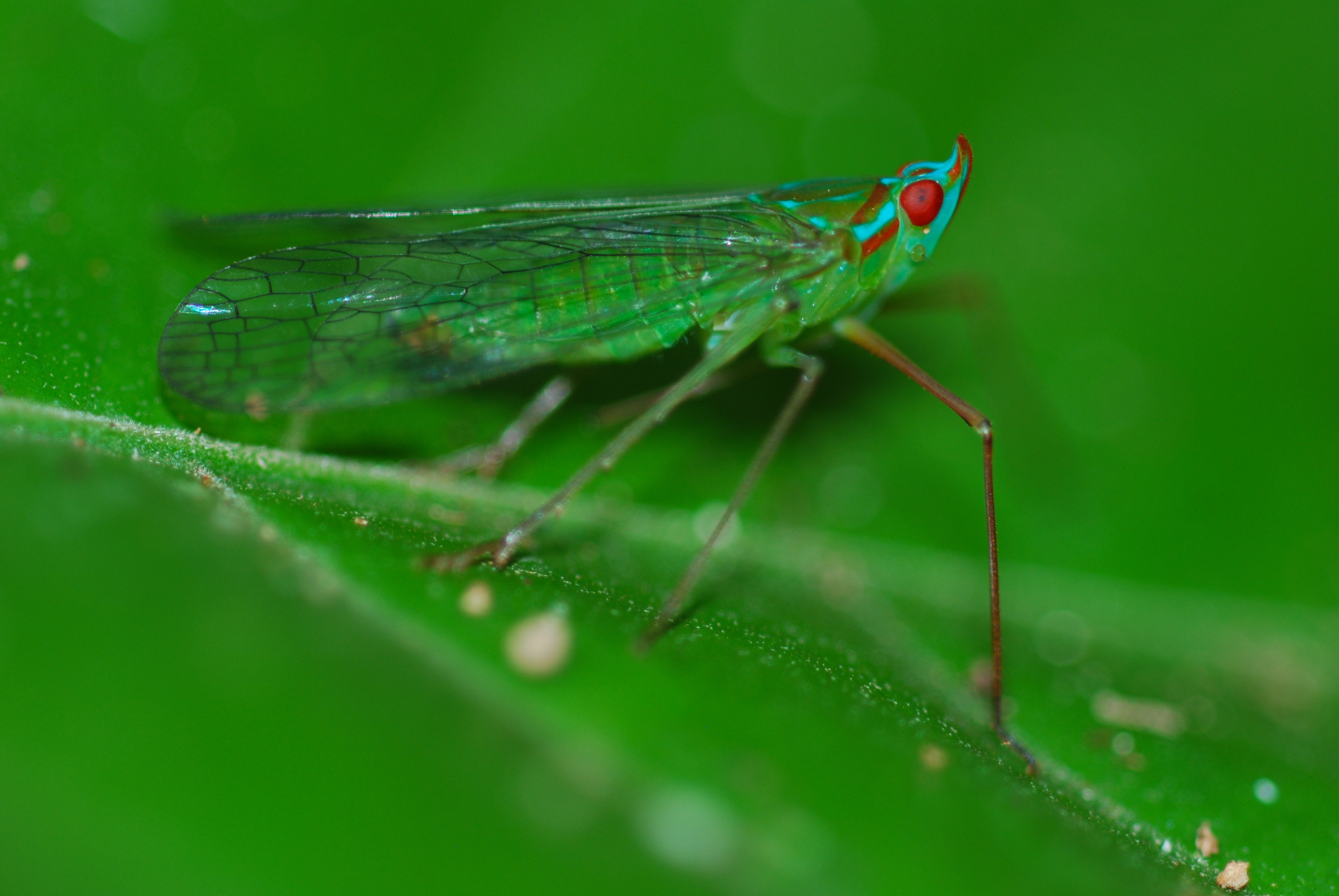 Taman Negara NP, Pahang, MALAYSIA